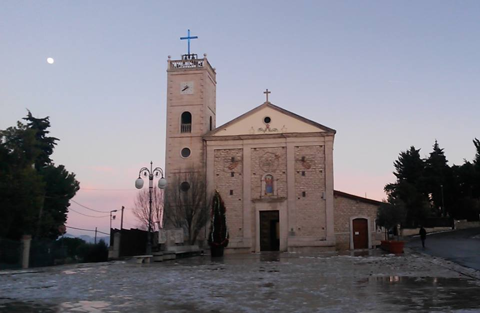 Church of Carpignano